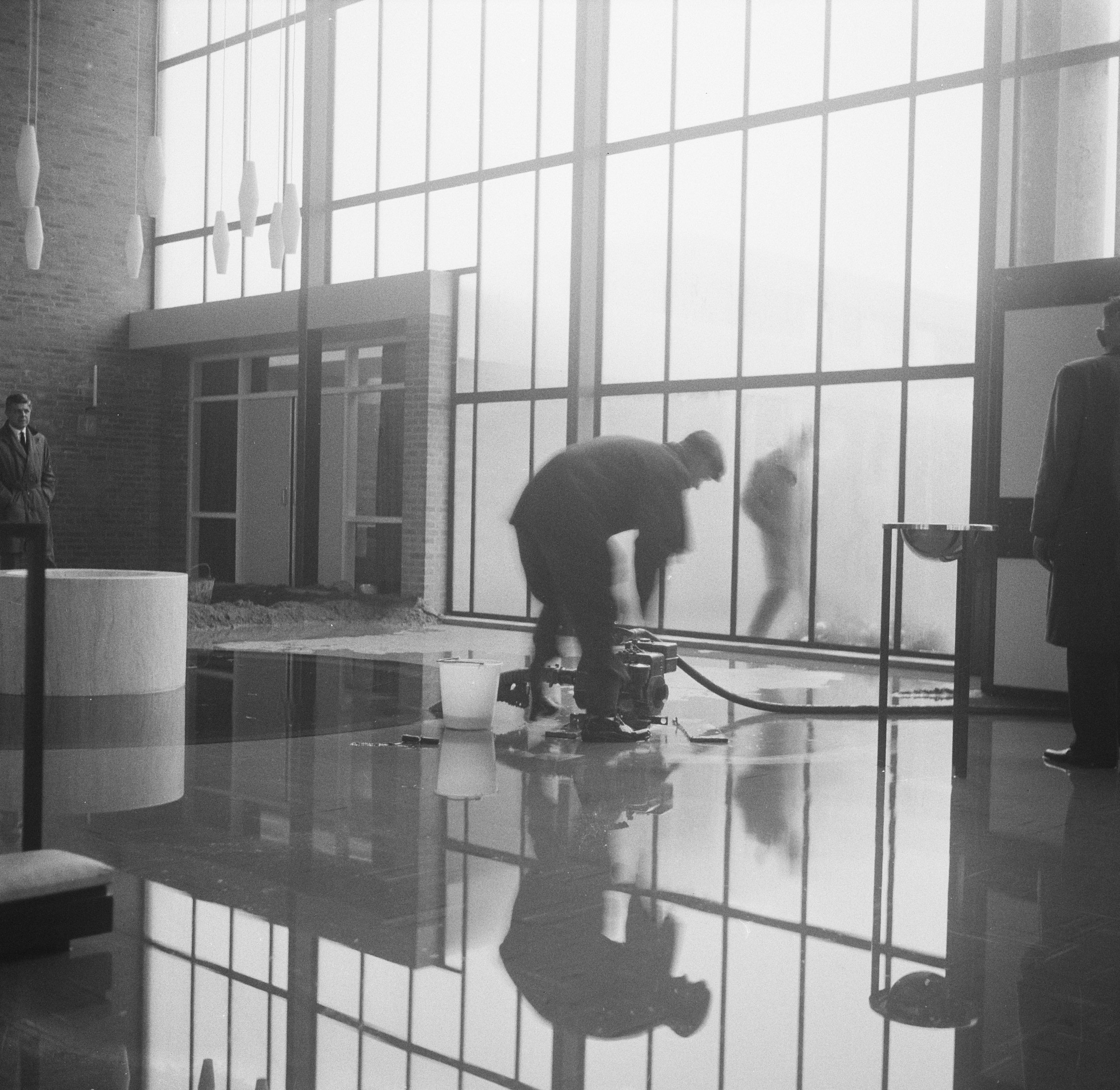 Collectie / Archief : Fotocollectie Anefo Reportage / Serie : [ onbekend ] Beschrijving : Stormschade aan de rooms-katholieke Maria Reginakerk in Boxtel ( Noord Brabant ). Met een pomp haalt men het water uit de kerk Datum : 4 december 1960 Locatie : Boxtel, Noord-Brabant Trefwoorden : kerken, stormschade Fotograaf : Gelderen, Hugo van / Anefo Auteursrechthebbende : Nationaal Archief Materiaalsoort : Negatief (zwart/wit) Nummer archiefinventaris : bekijk toegang 2.24.01.03 Bestanddeelnummer : 911-8434 Reacties Geplaatst door Ruud van Nooijen op 24 december 2015 - 18:01. Betreft de inmiddels gesloopte rooms-katholieke Maria Reginakerk te Boxtel in wijk Selissenwal.